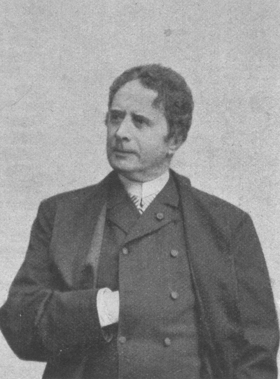 Der deutsche Schauspieler Friedrich Haase (1825-1911).